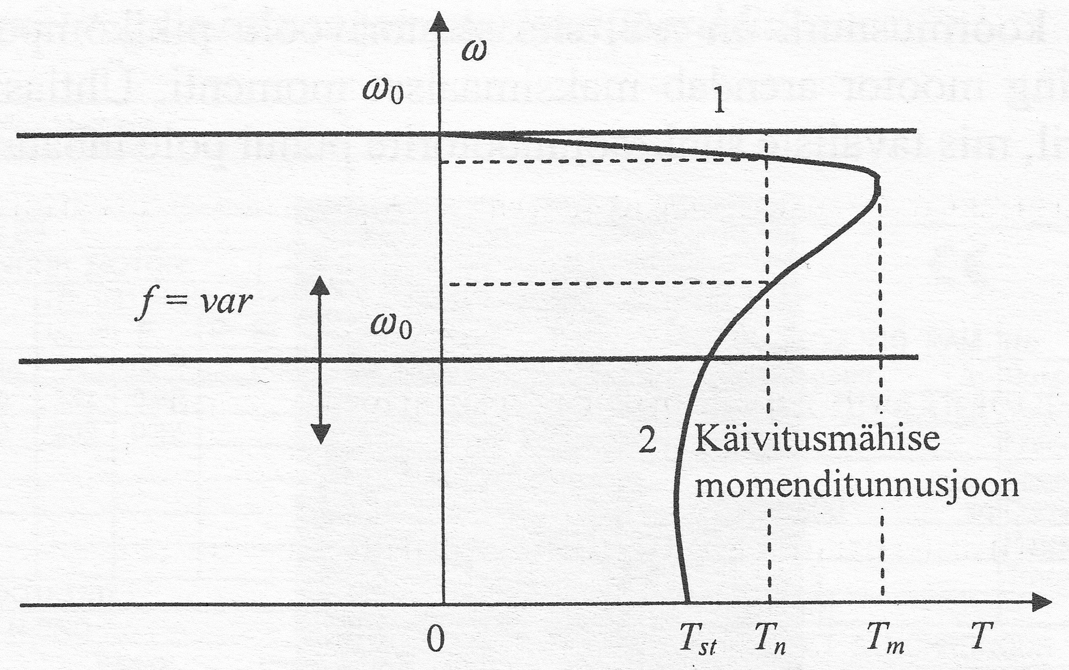 Käivitusmähise momenditunnusjoon